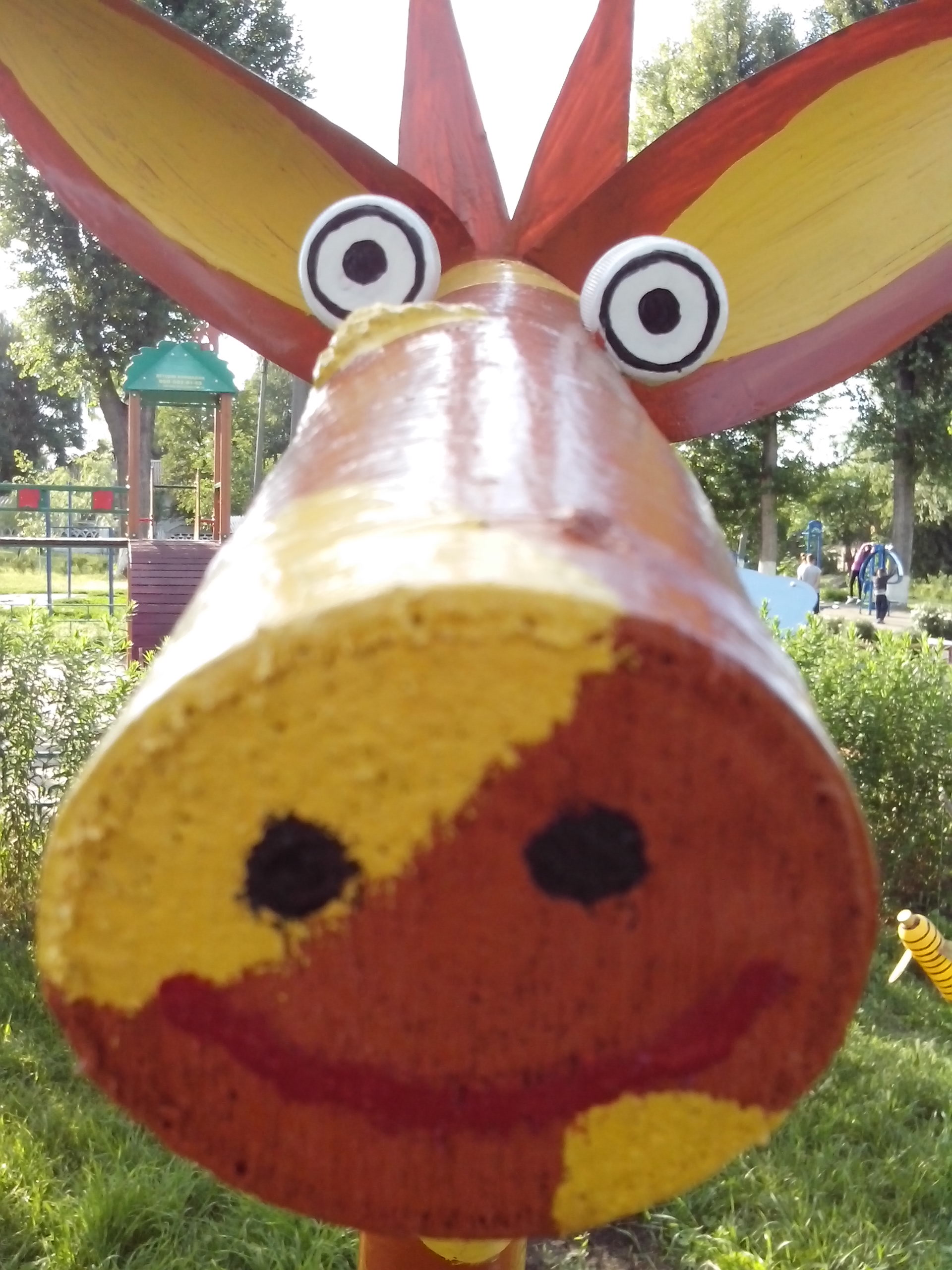 Жирафа у парковій зоні